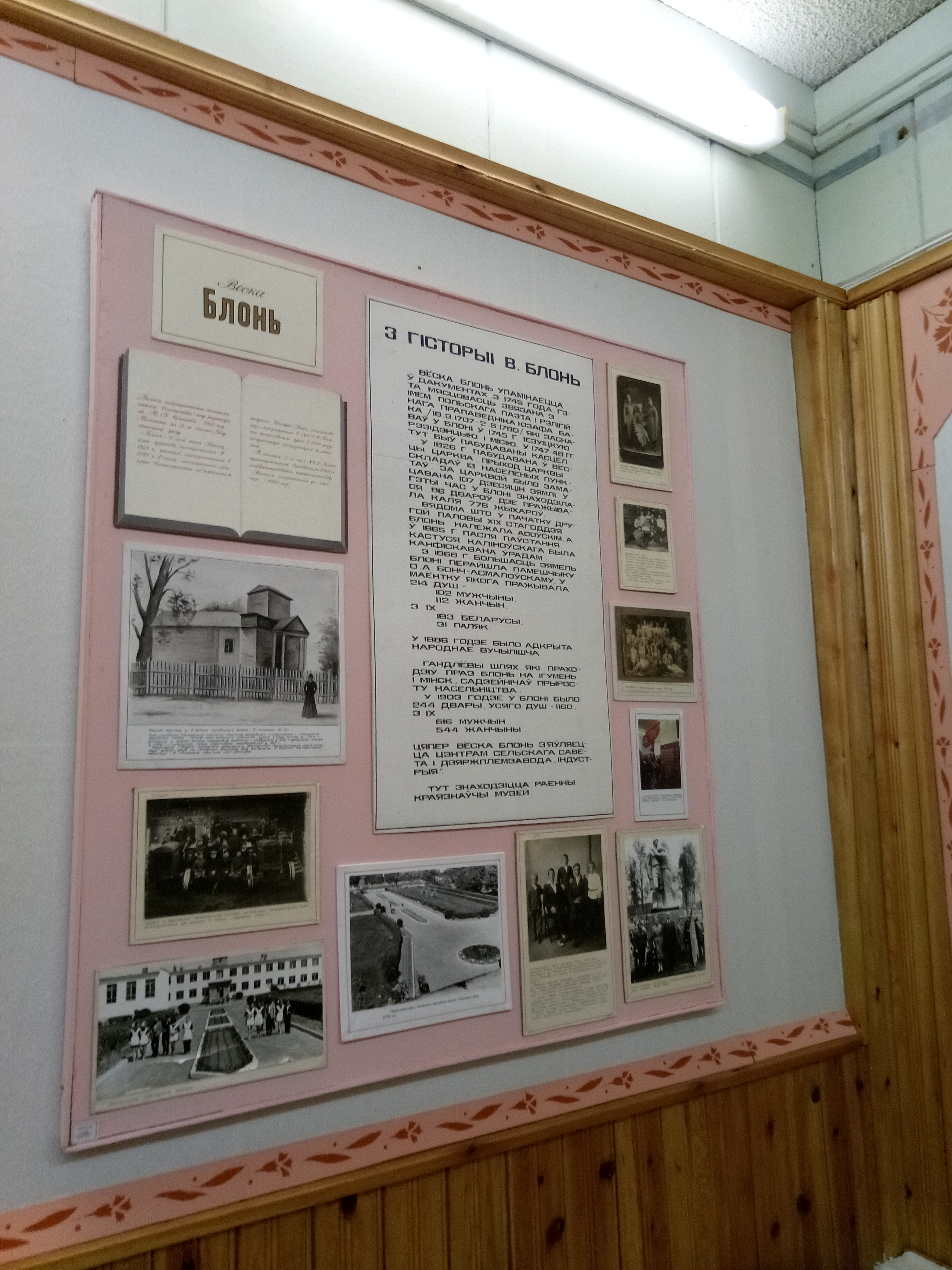 Экспазіцыя музея.